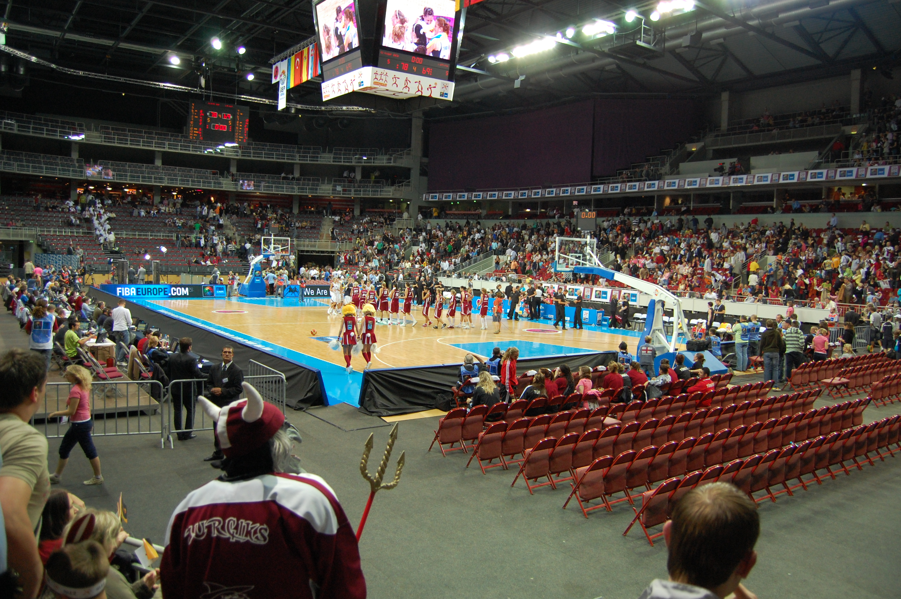 Latvija vs. Slovakia Eurobasket Women 2009